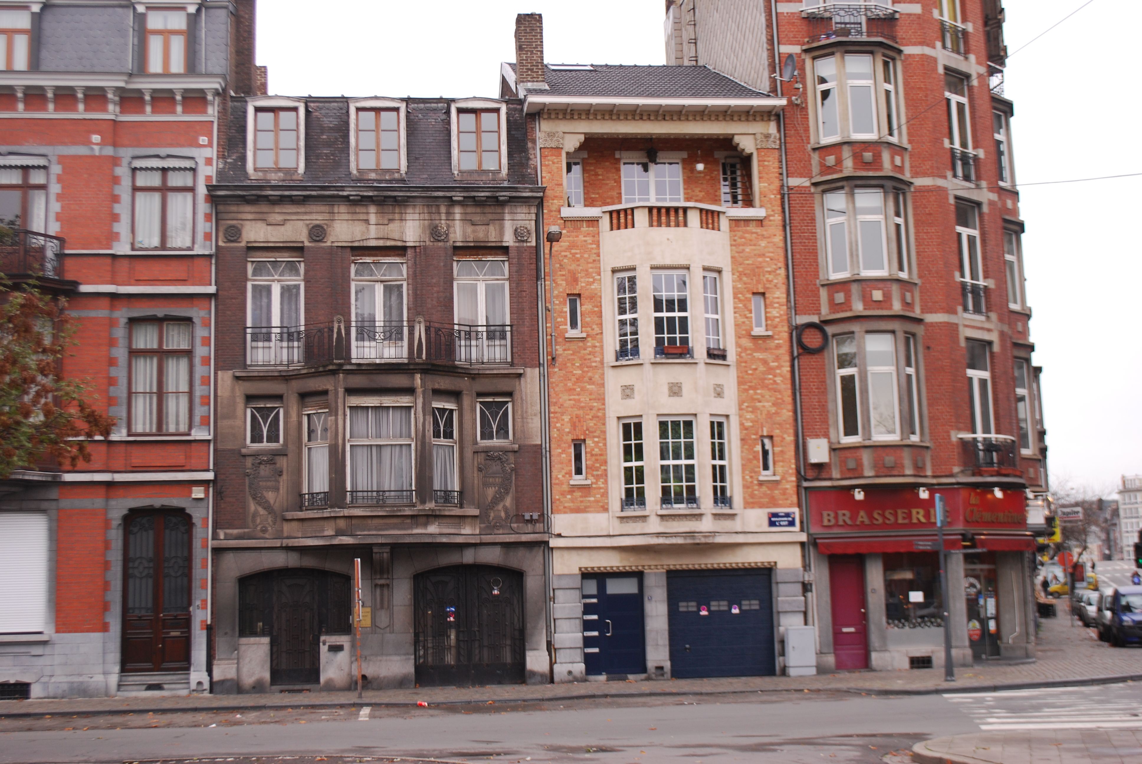 Le boulevard de l'Est, dans le quartier d'Outremeuse à Liège.